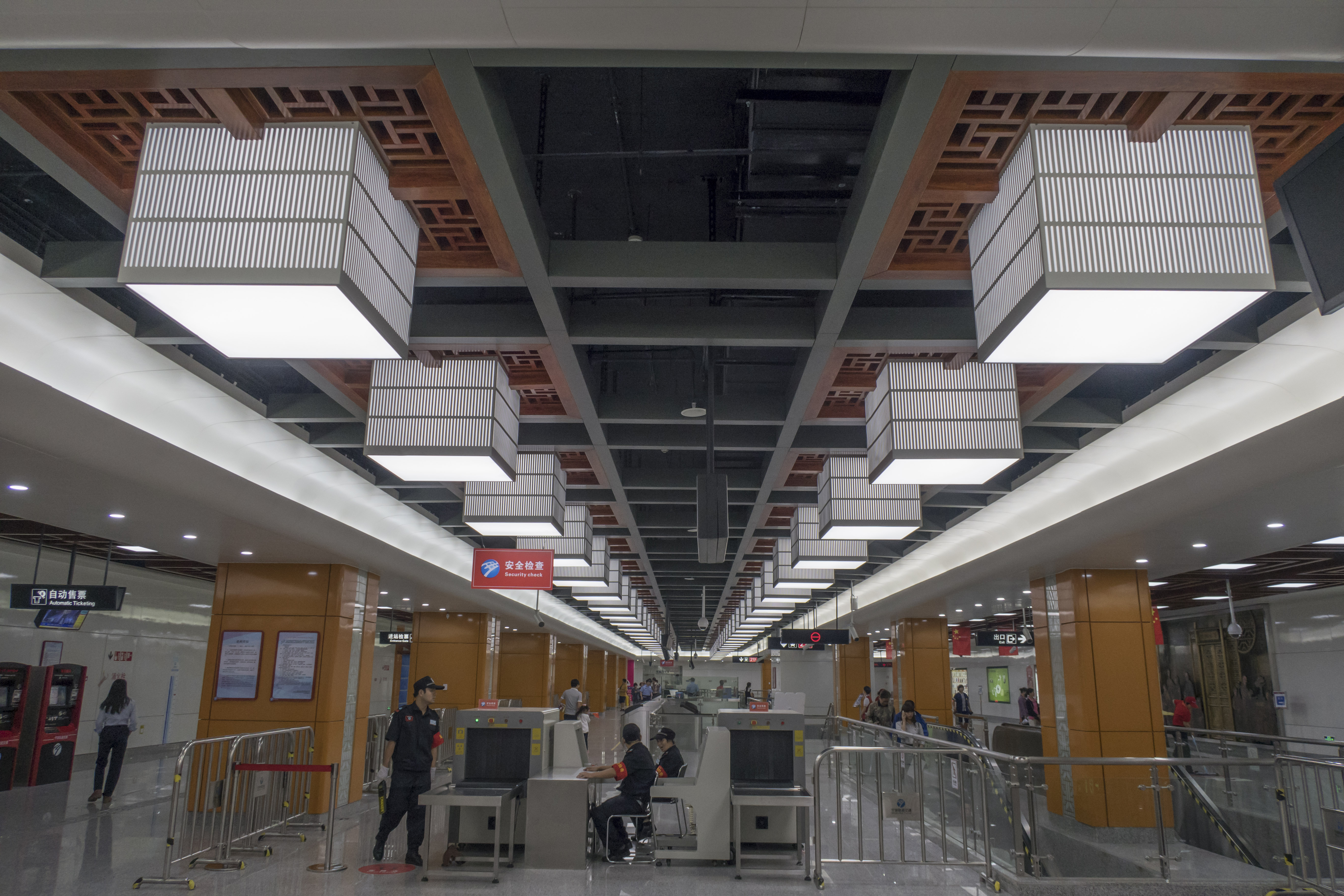 宁波地铁2号线城隍庙站